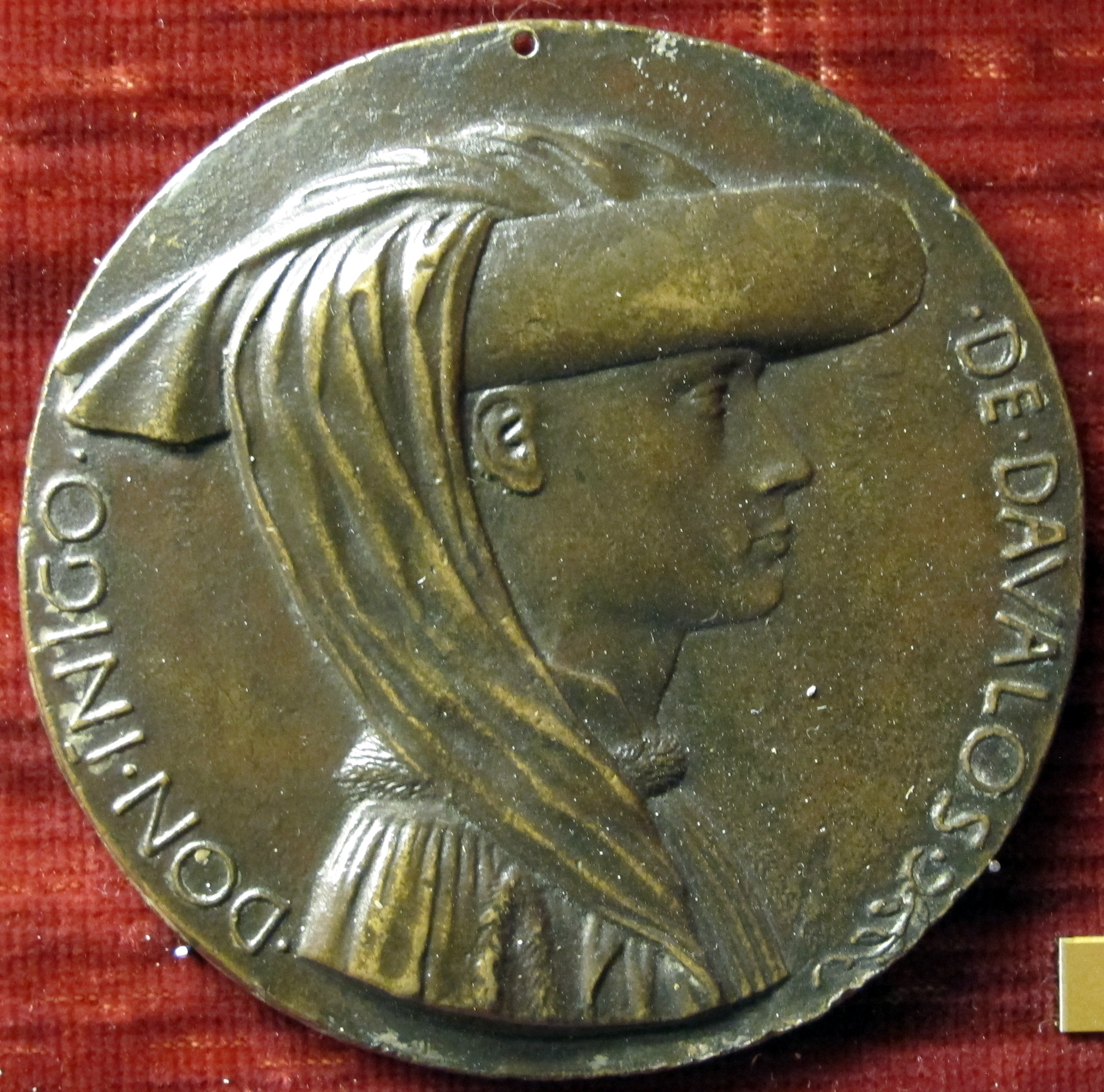 Medaglia di don Inigo d'Avalos, gran ciambellano, recto